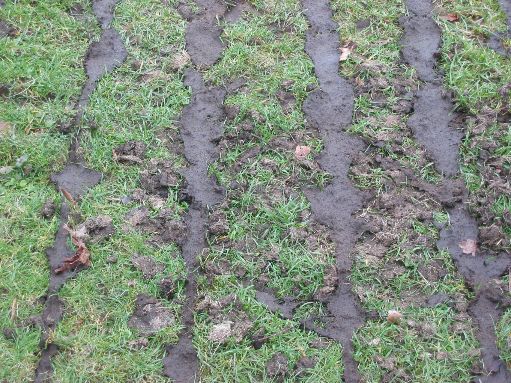 Sleufkouterbemester met mest gevulde gleufjes. – cf. Image:Sleufkouterbemester.jpg